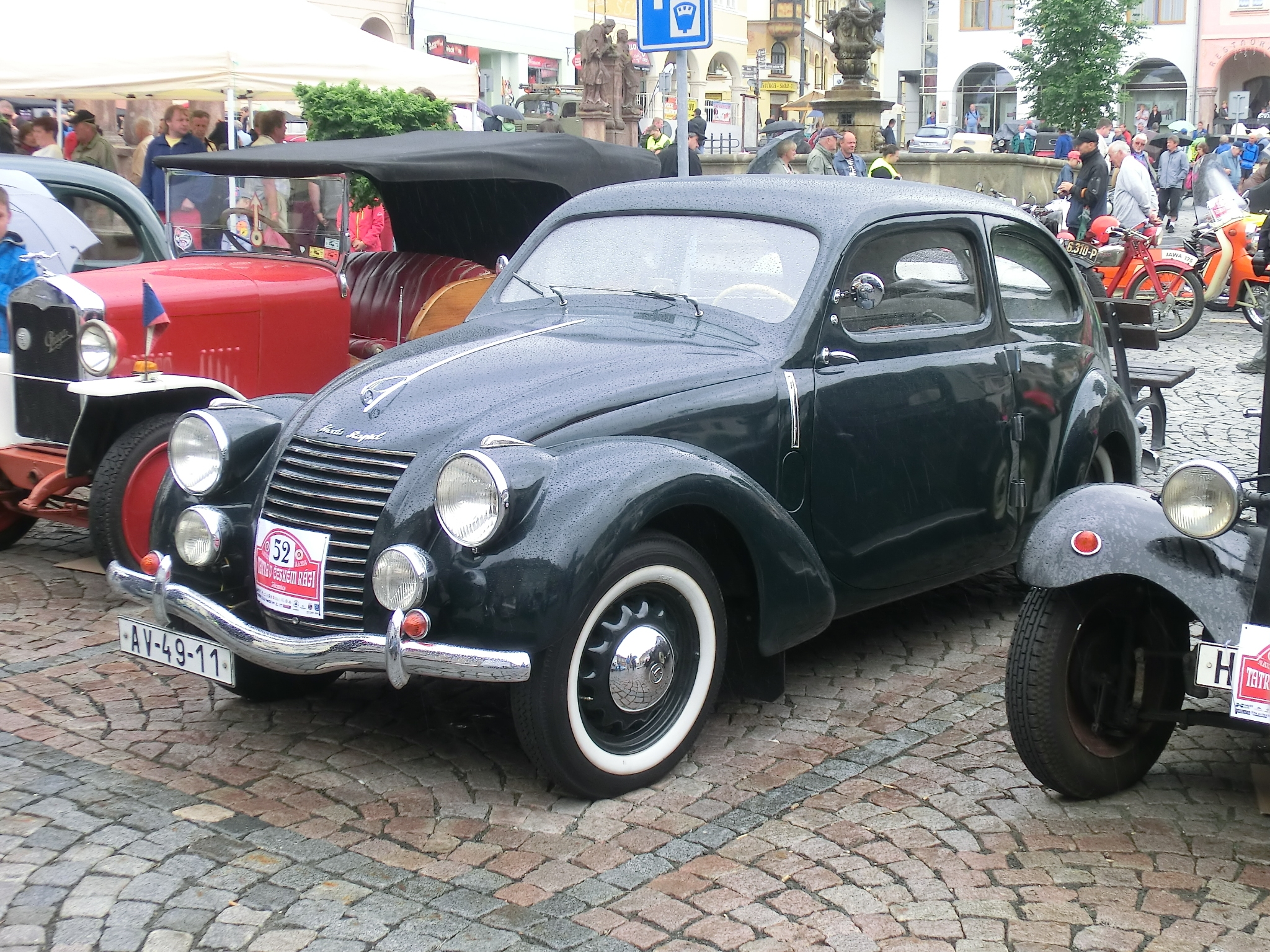 Jilemnice, akce Tatra v Českém ráji 2014.